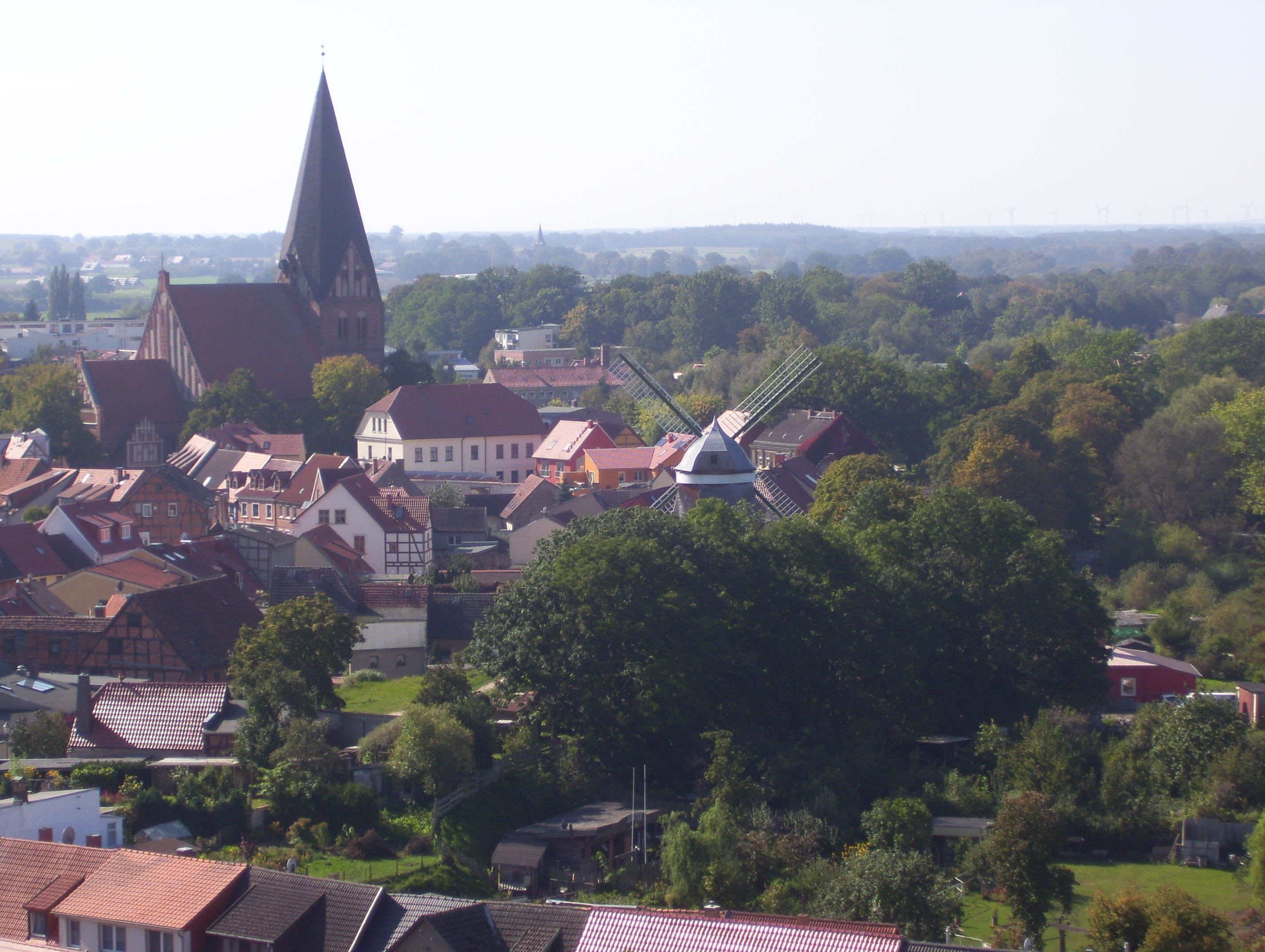 Röbel/Müritz, Blick vom Turm der Marienkirche zur Nikolaikirche